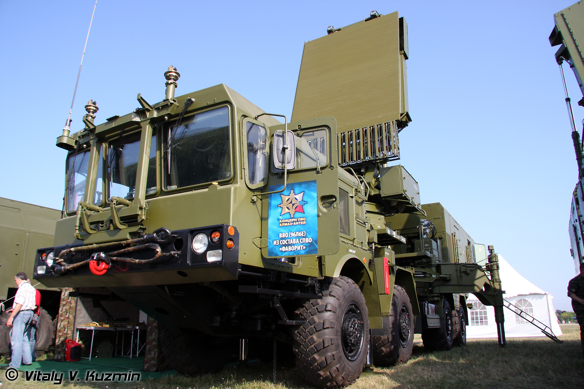 Всевысотный обнаружитель 96Л6Е (All-altitude target detector 96L6E)